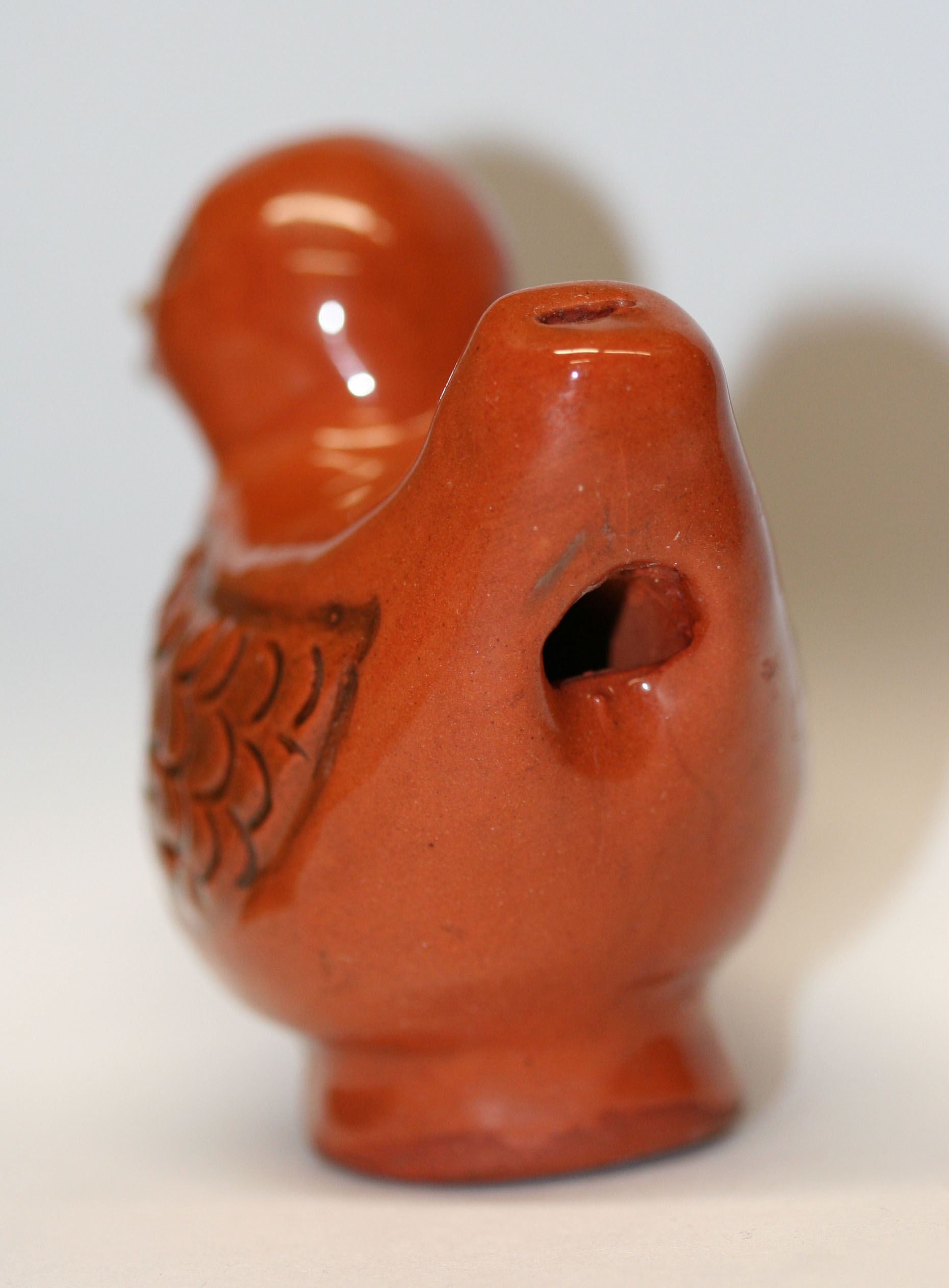 Péckvillchen Ublos- an Tounlach.